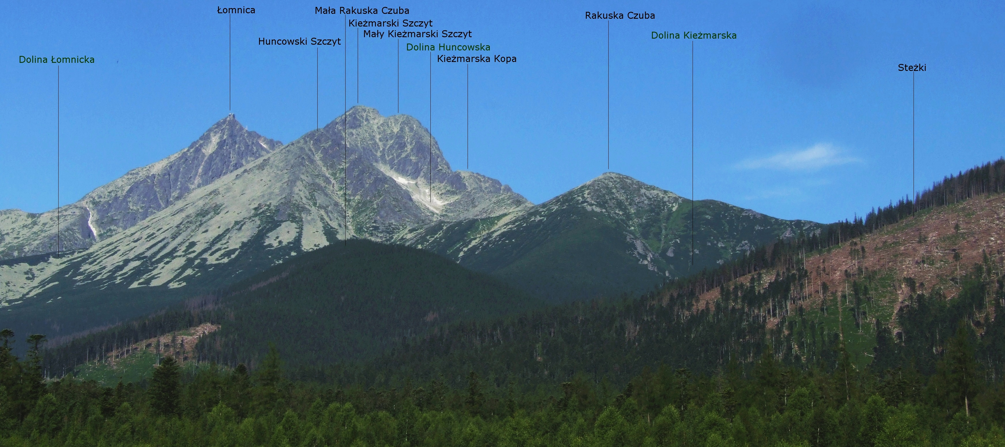 Widok z okolicy Kieżmarskich Żłobów